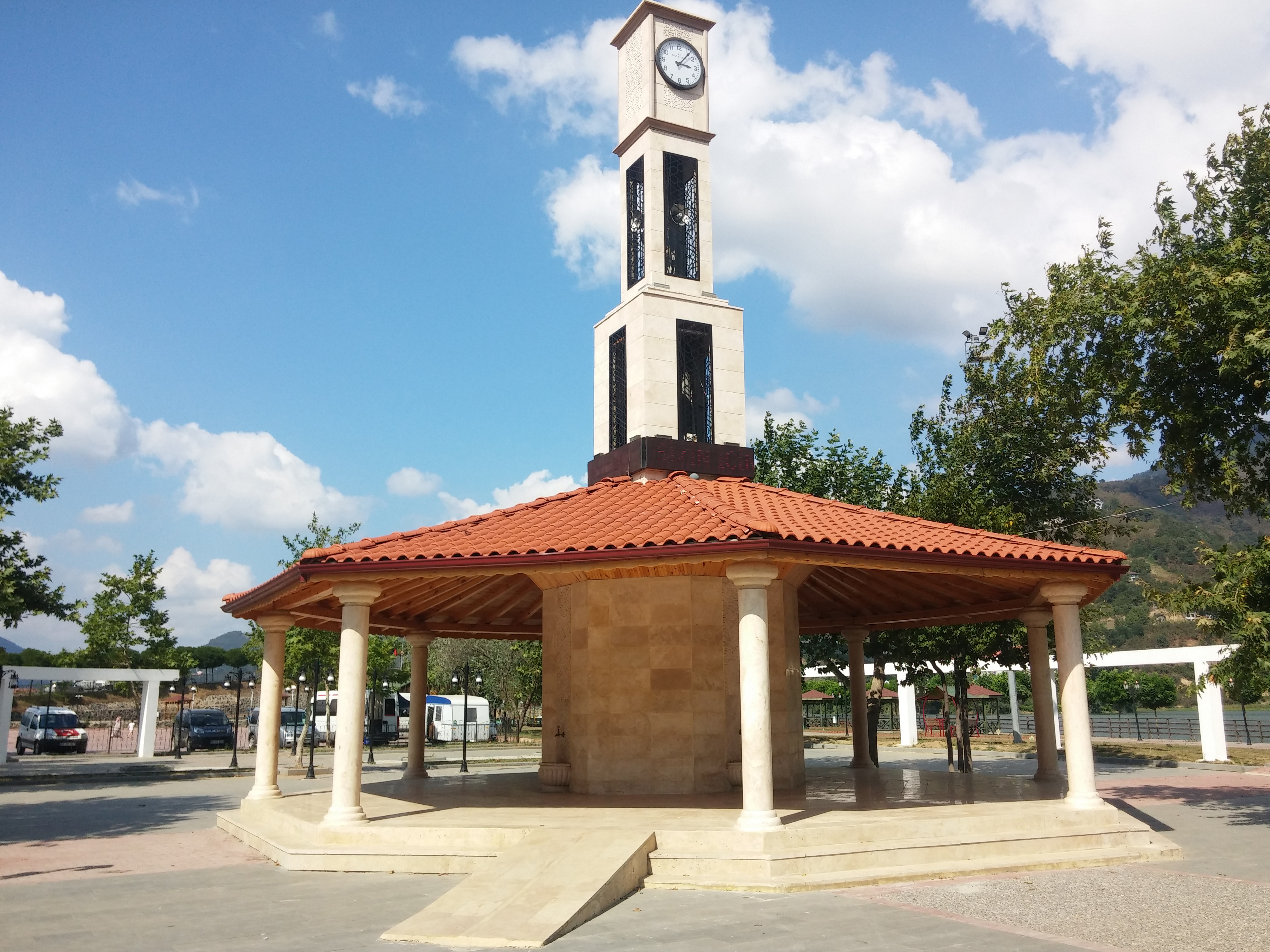 Samsun'un Ayvacık ilçesinde 2014 yılında inşa edilen saat kulesi ve şadırvanı.